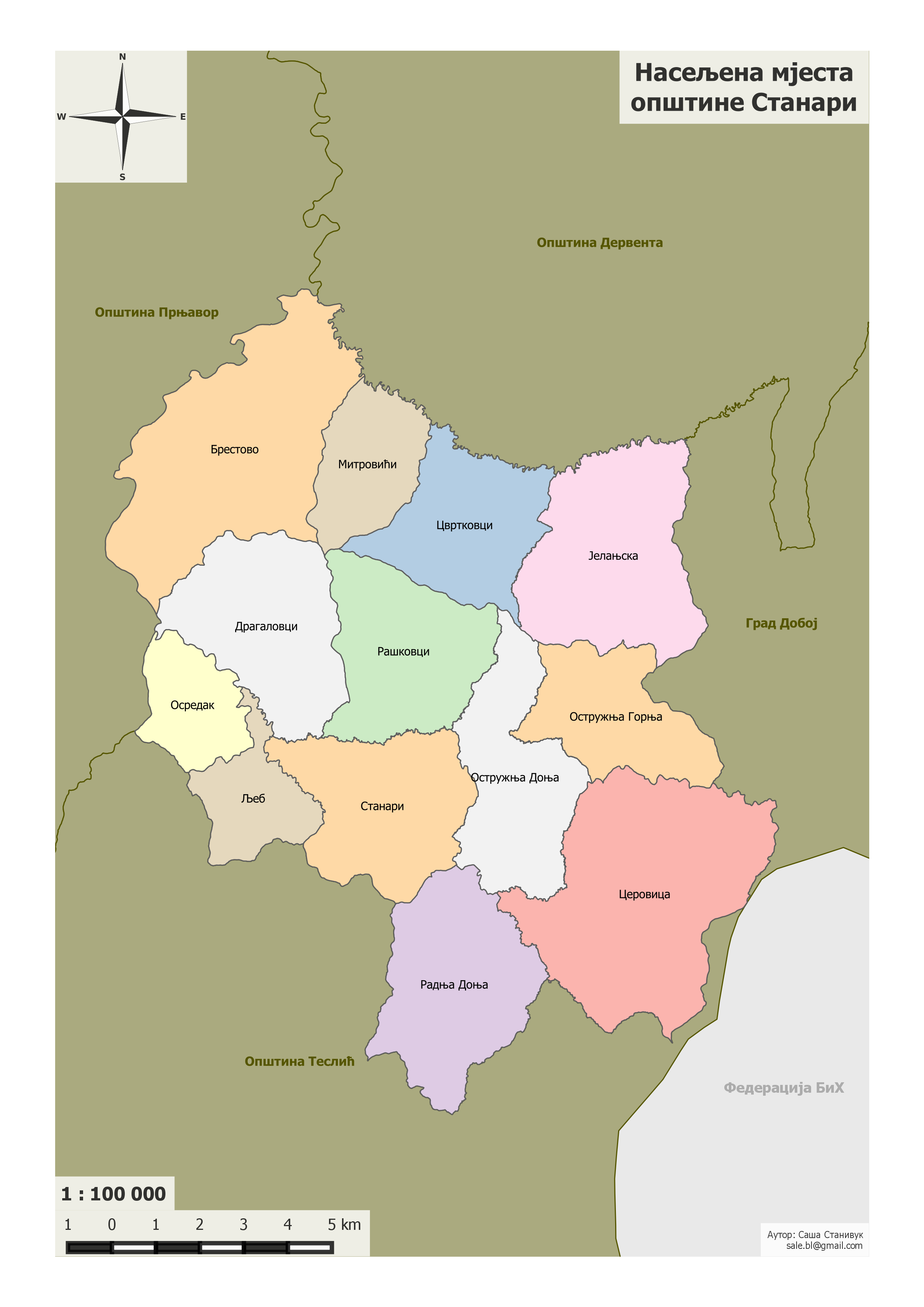 Српски (ћирилица): Насељена мјеста општине Станари